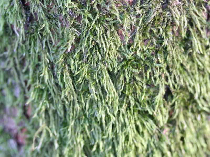 Atlantisches Schlafmoos (Hypnum resupinatum), Teufelsmoor bei Horst